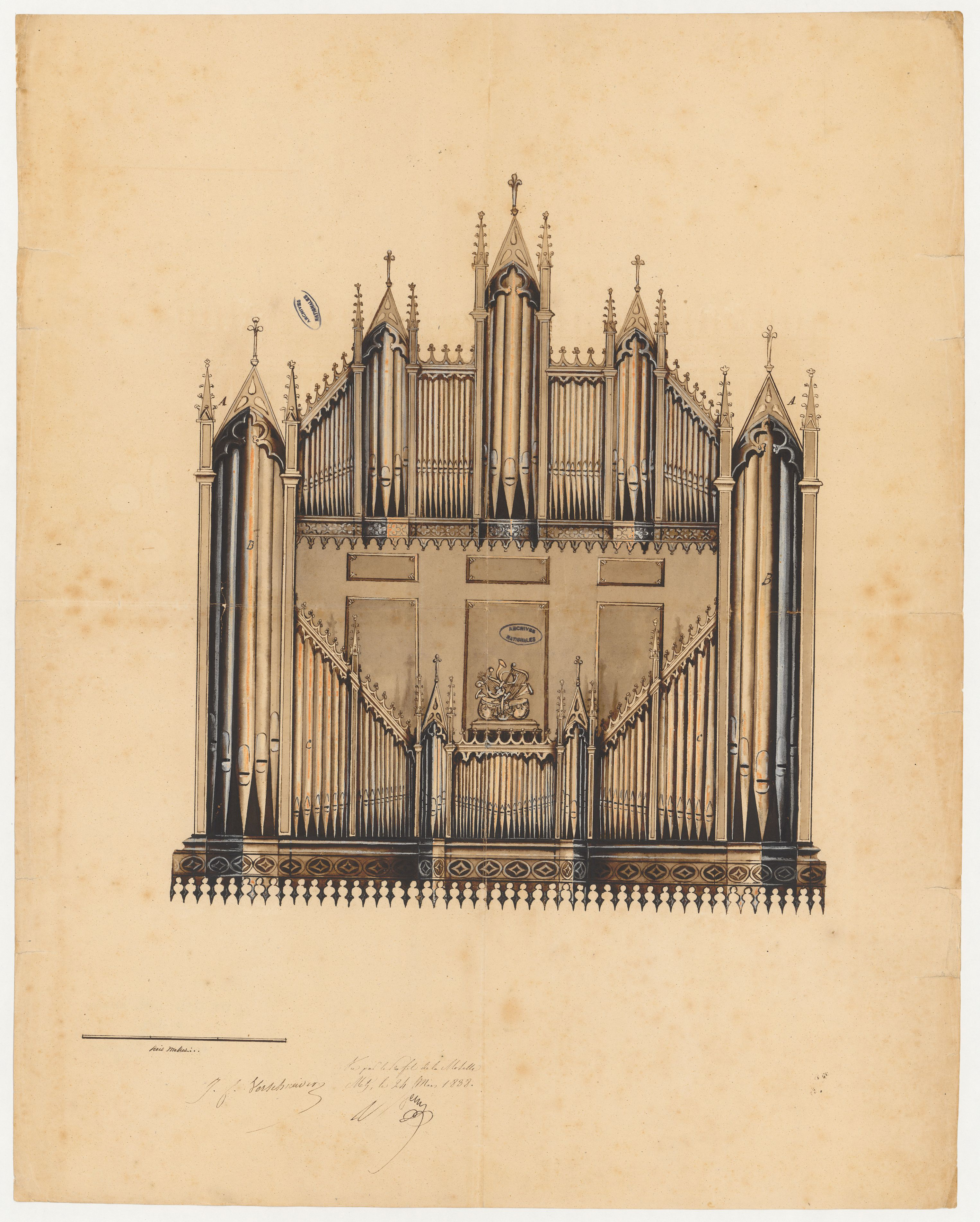 "Cathédrale de Metz. Orgue. Dessin d'architecture issu des dossiers de travaux de restauration des cathédrales (1802-1912), conservés aux Archives nationales (inventaire et autres documents numérisés consultables en ligne).